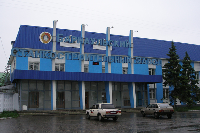 Барнаульский станкостроительный завод. Вид с ул. Кулагина